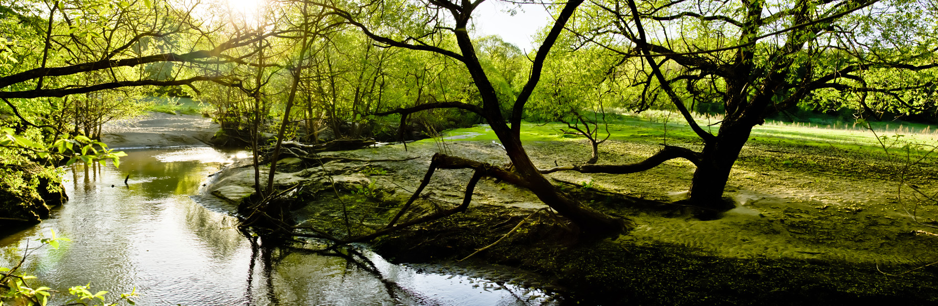 Пензенская область, Лопатиский район, р.